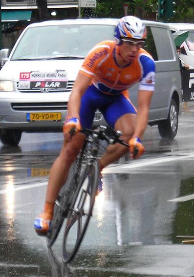 Pedro Horrillo en la 20ª etapa del Giro de Italia 2007 (Bardolino - Verona, 43 km CRI)